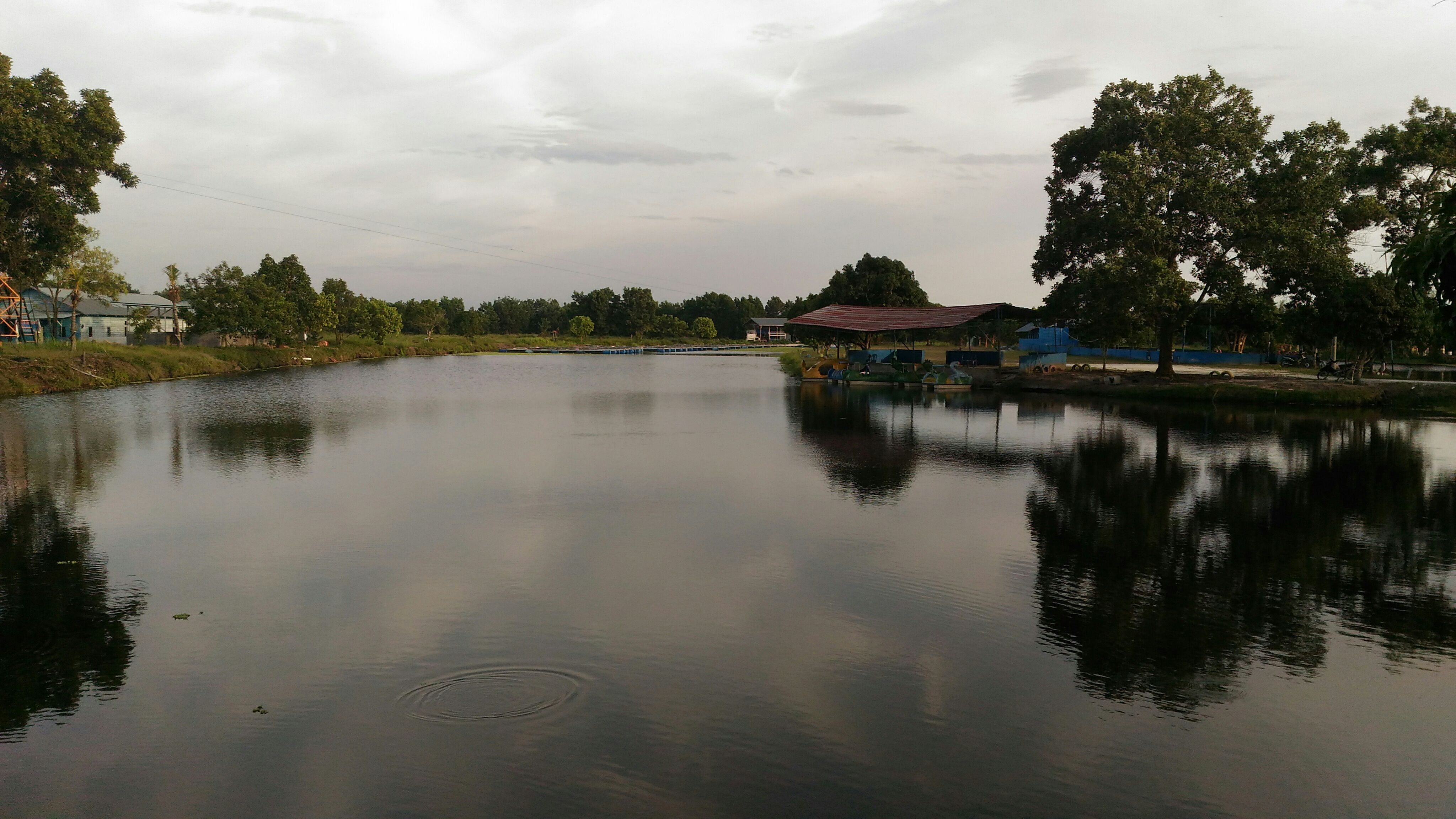 Danau wisata di Kecamatan Tambang